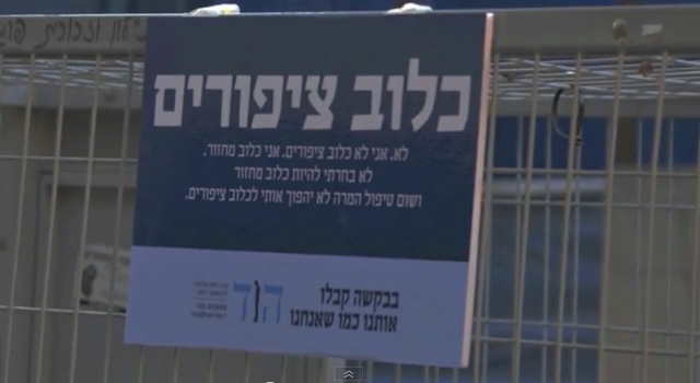 אחד משלטי הקמפיין נגד טיפולי המרה באזורי מגורים חרדיים